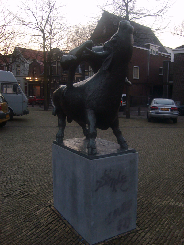 Monument voor de Westzijderkerk te Zaandam. Stier met vrouw uit 1997 van Julia van Verschuer